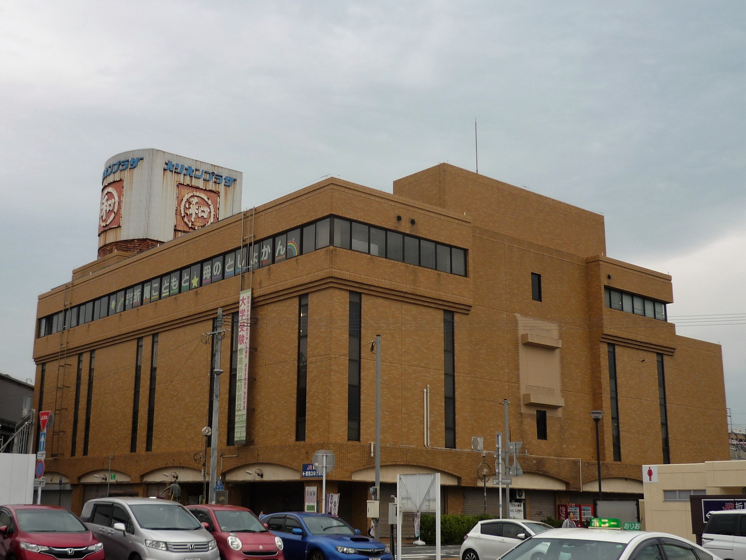 折尾駅東口駅前のオリオンプラザ